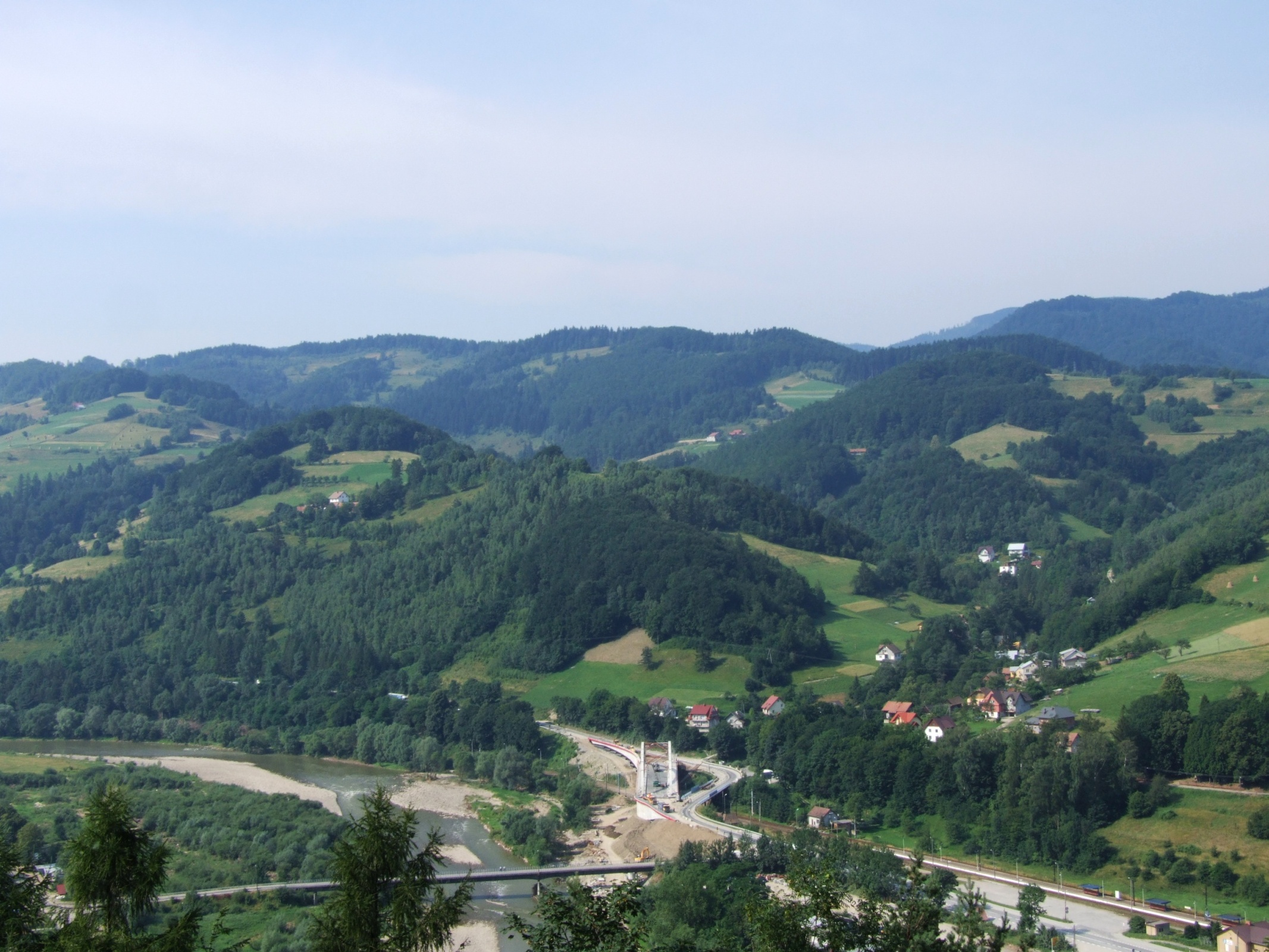 Widok z Zamku w Rytrze na dolinę Popradu, uchodzącą do niej dolinę potoku Kordowiec i położoną nad nią miejscowość Obłazy Ryterskie